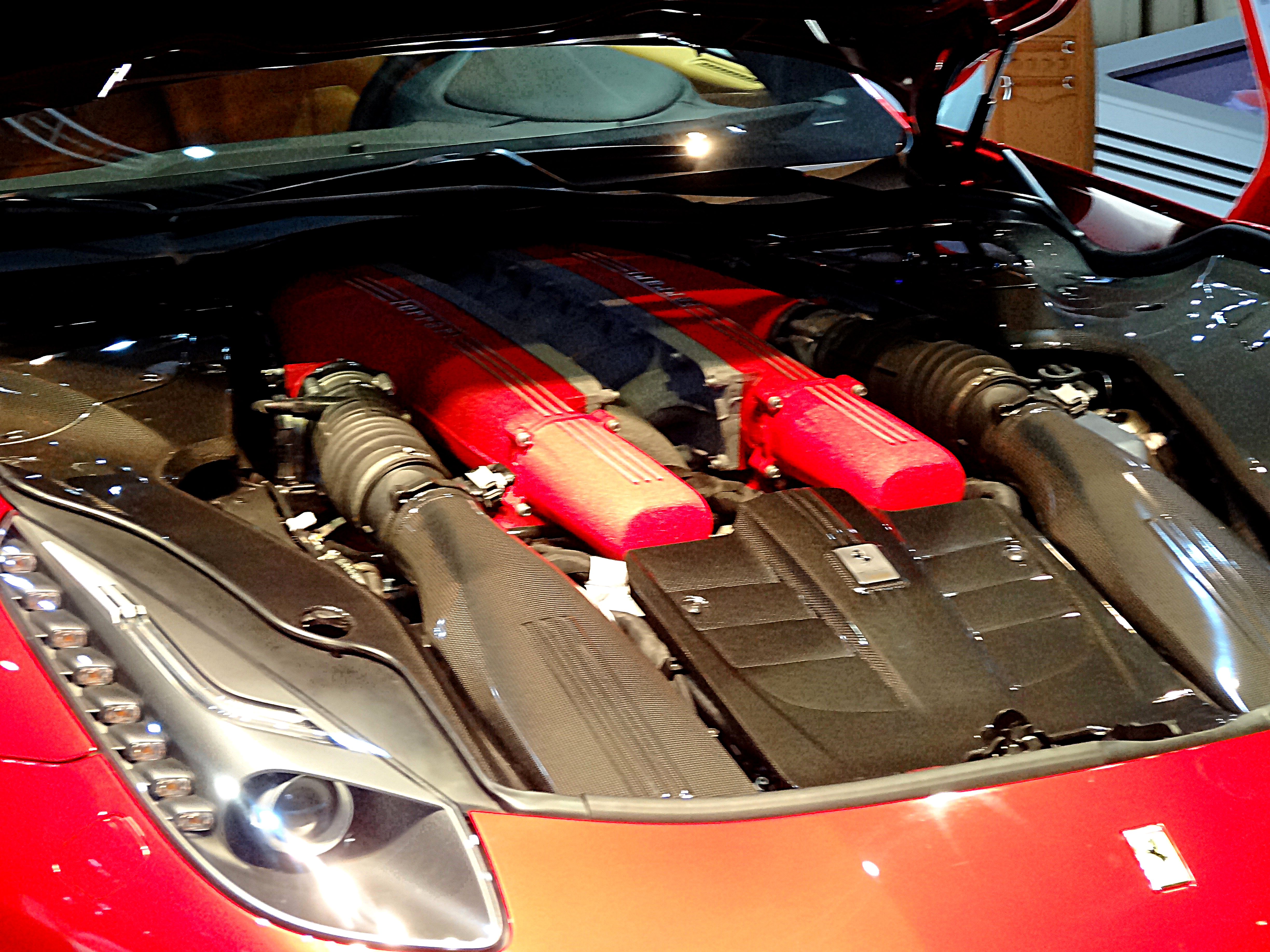 À 8 250 tr/min : 740 ch (soit 546 kW) À 6 000 tr/min : 690 Nm Poids1 525 kg Vitesse maximale 340 km/h 0 à 100 km/h en 3,1 s Coefficient de traînée 0,29 275 386 €